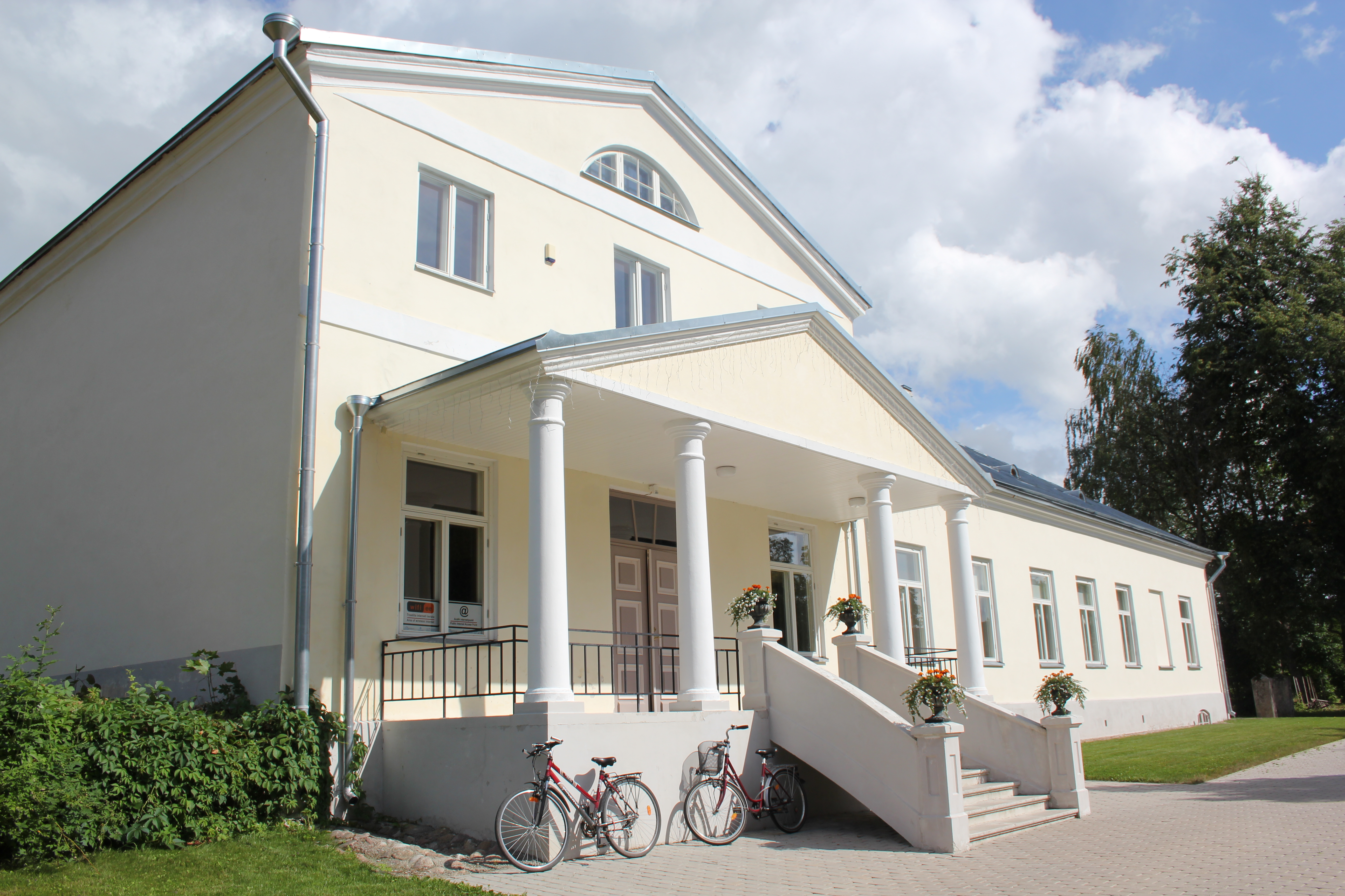 Pajusi mõisa peahoone